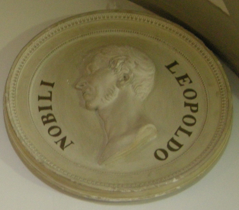 Specola, medaglione di leopoldo nobili